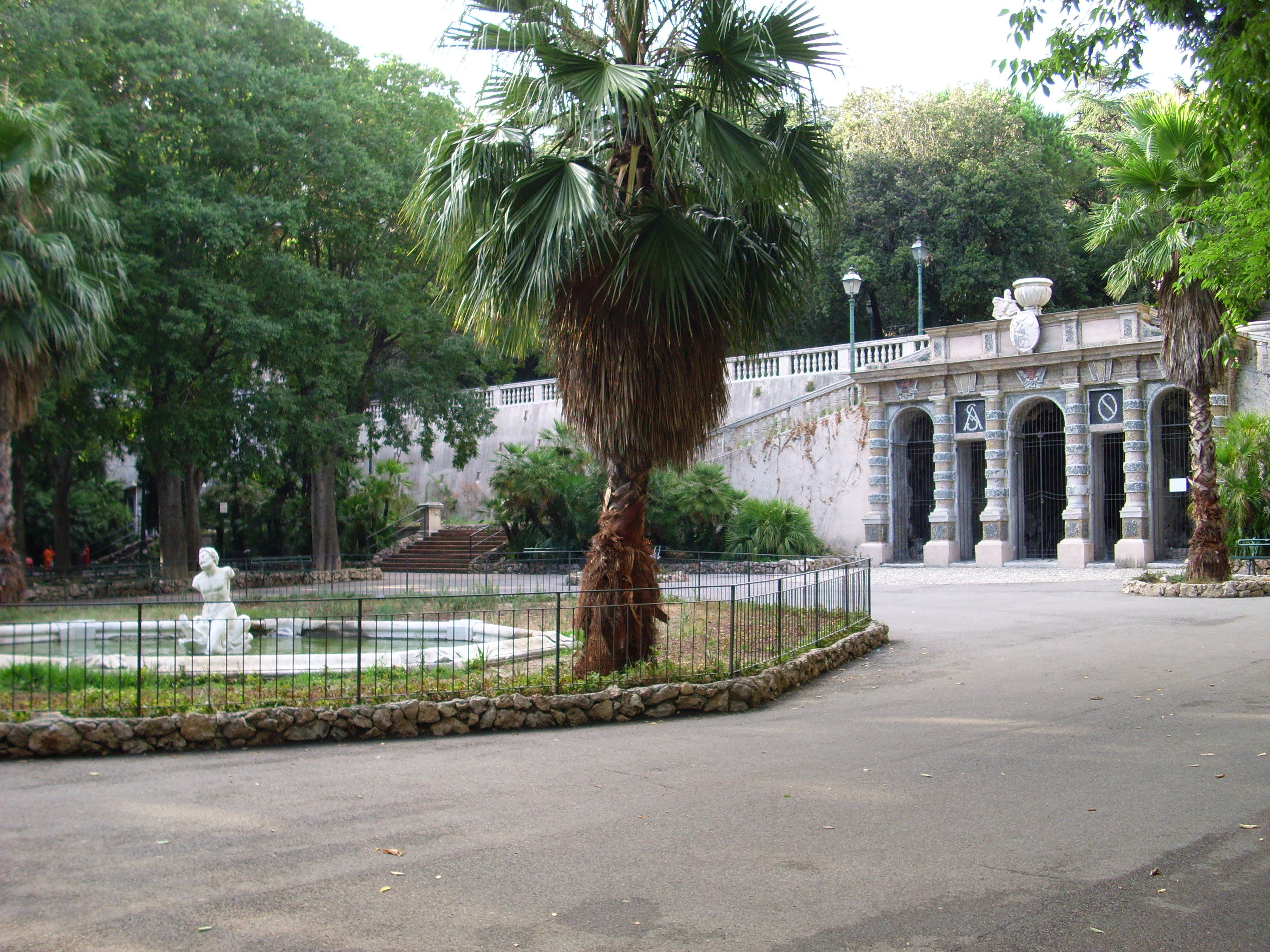 Il parco di Villa Imperiale Scassi, Genova Sampierdarena